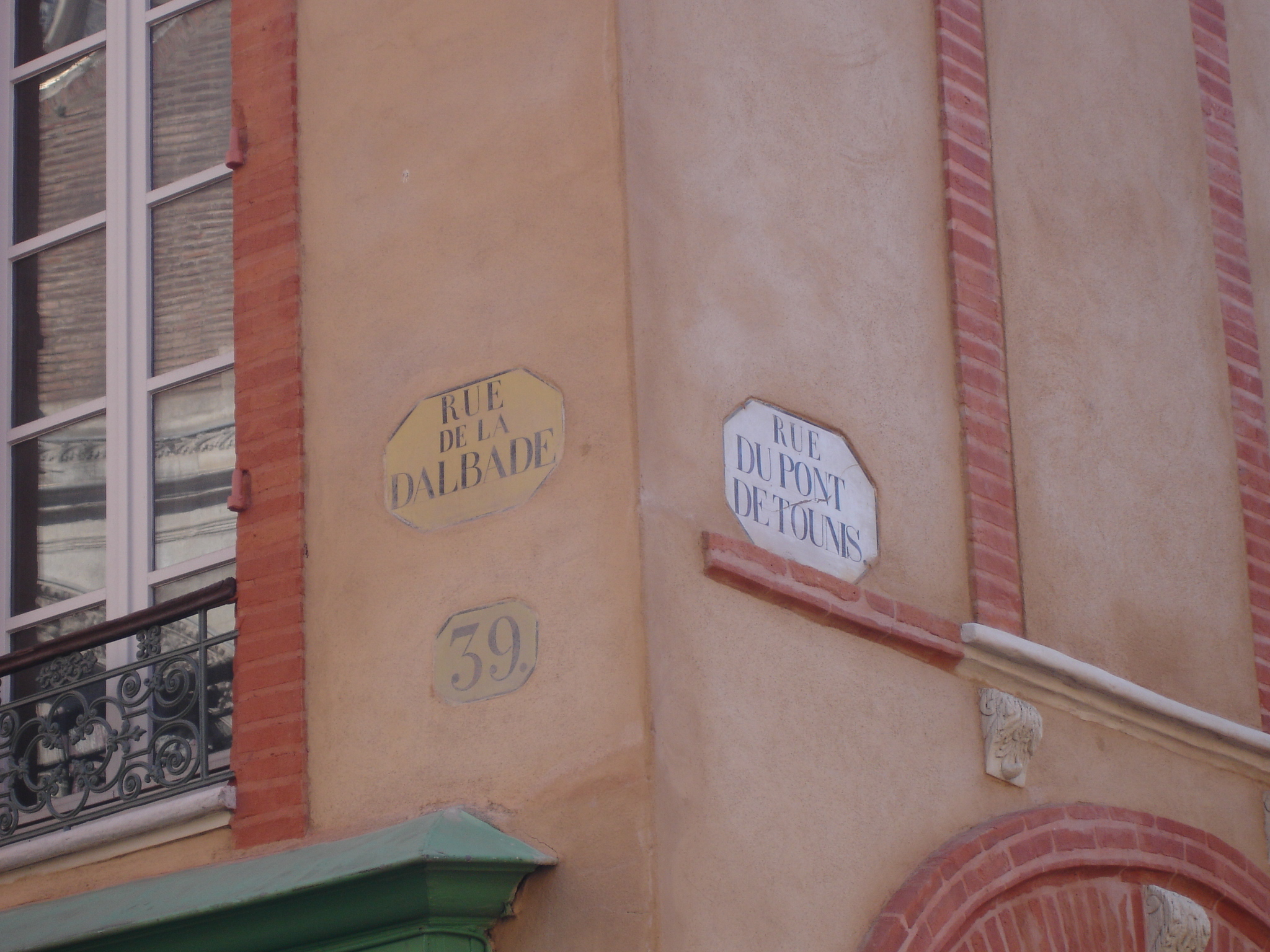 Croisement des rues de la Dalbade et du Pont de Tounis à Toulouse (Haute-Garonne, France). Les plaques jaunes indiquaient les rues parallèles au cours de la Garonne, les plaques blanches les rues perpendiculaires au cous de la Garonne.